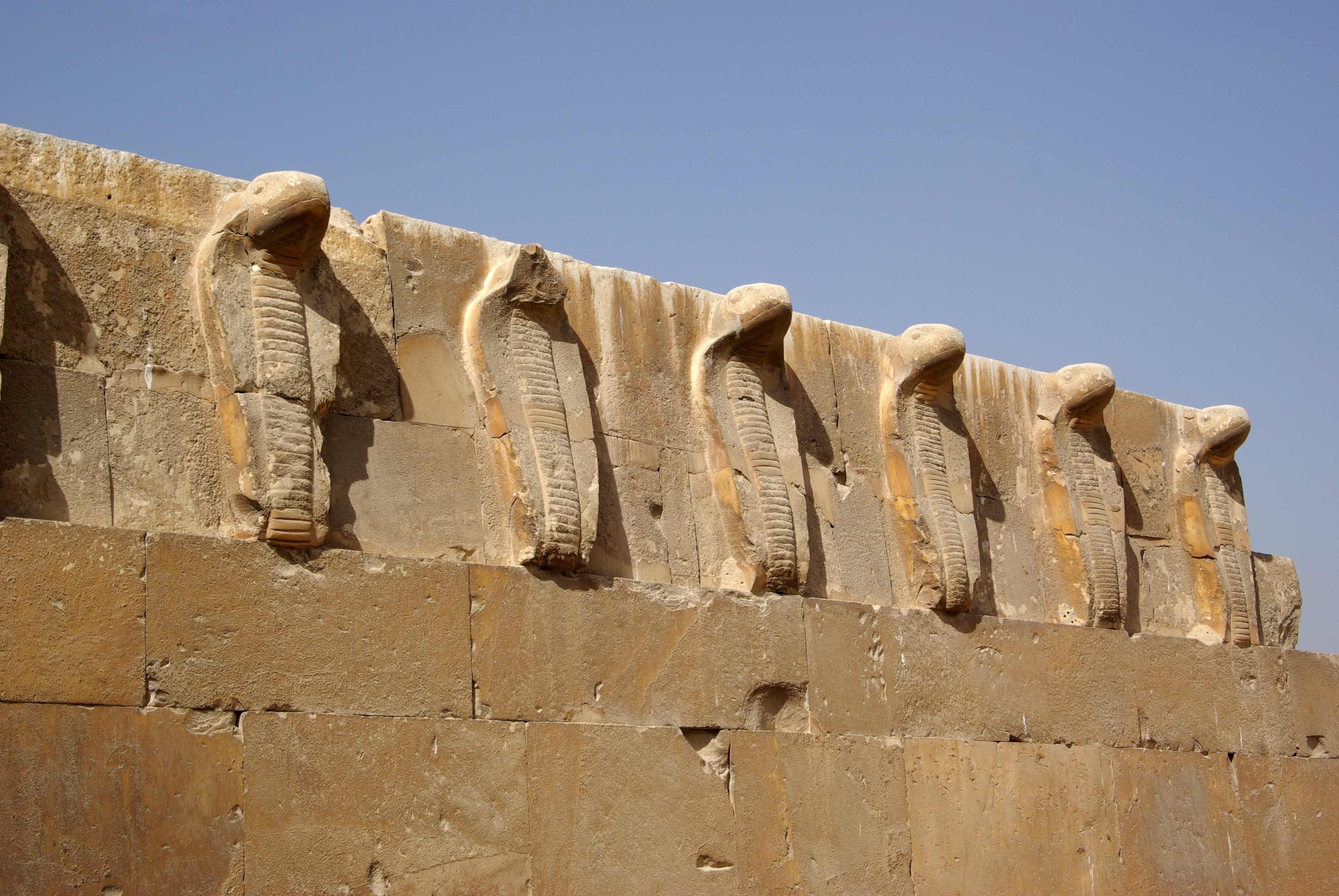 Ägypten, Sakkara, Fries mit Cobras